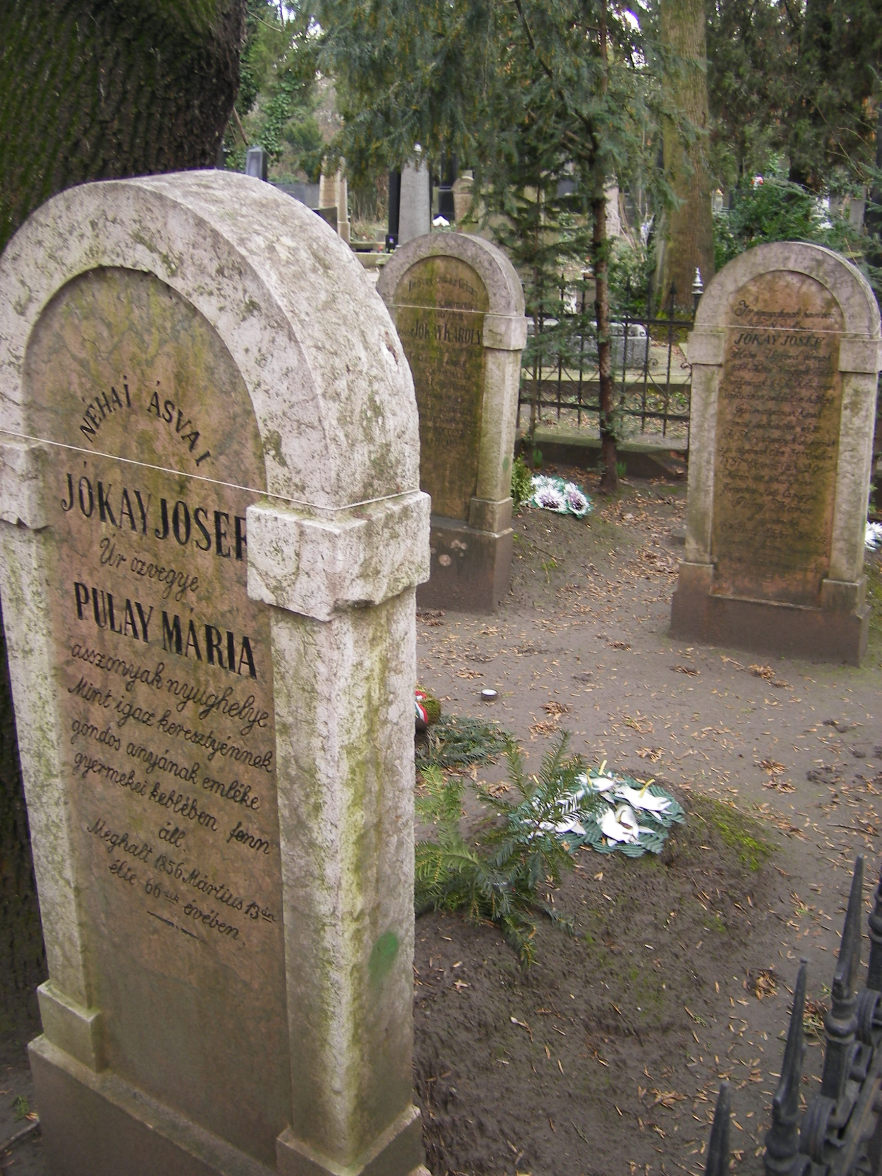 Jókai Mór családjának sírkertje a komáromi református temetőben